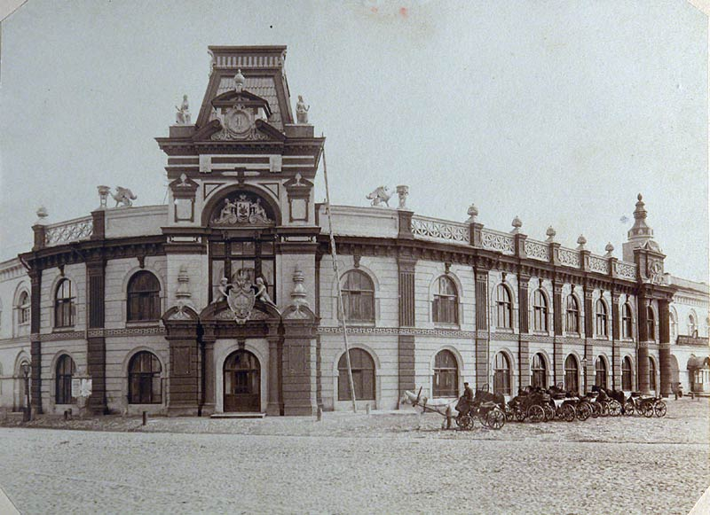 Гостиный двор. Казанский городской музей. Казань. Фотография начала XX века.